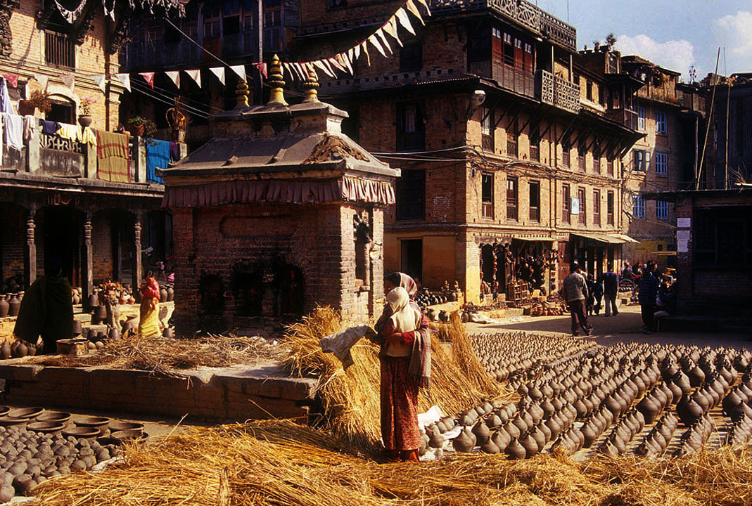 Nepalese market